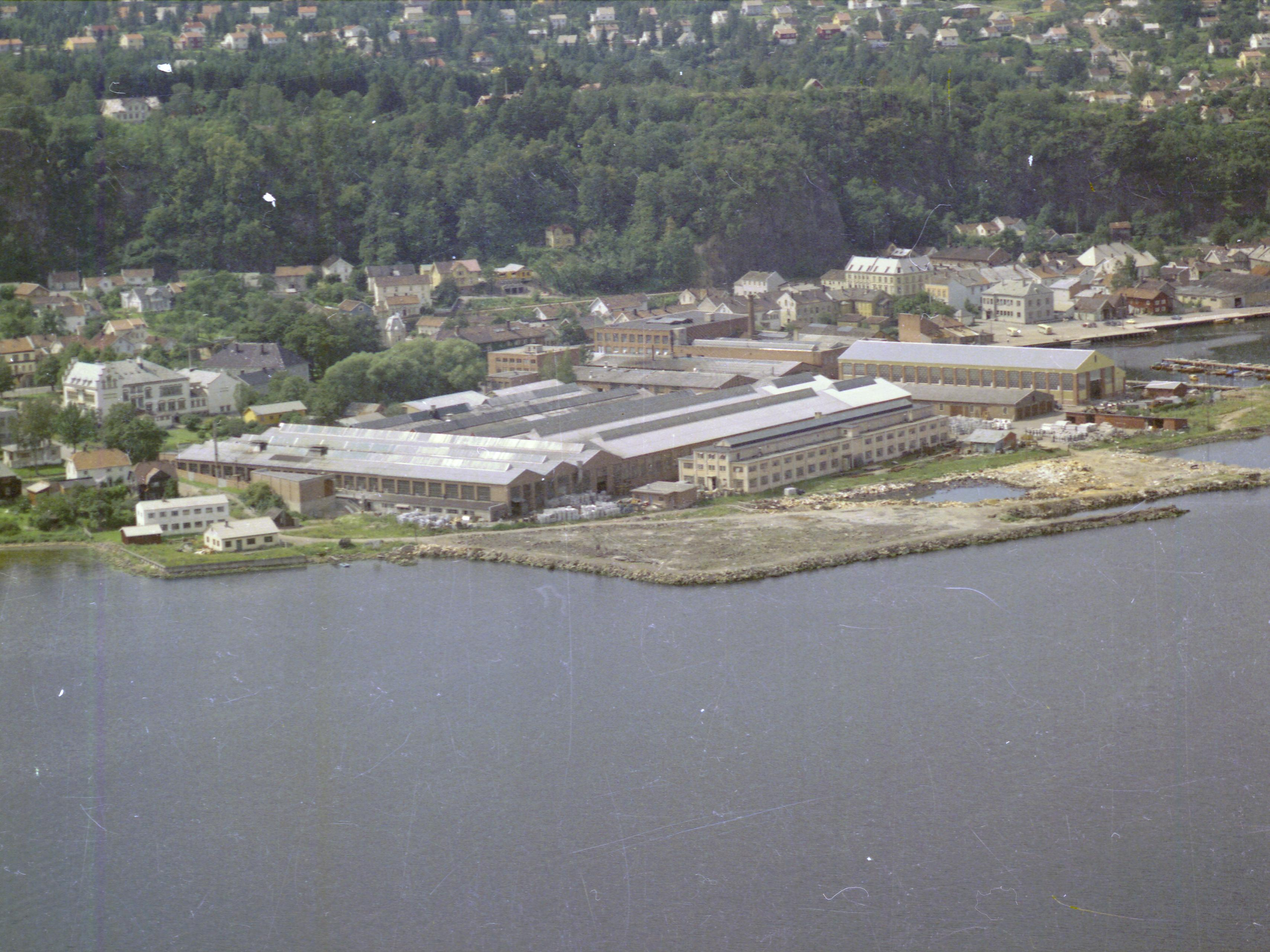 FW.HM.11982